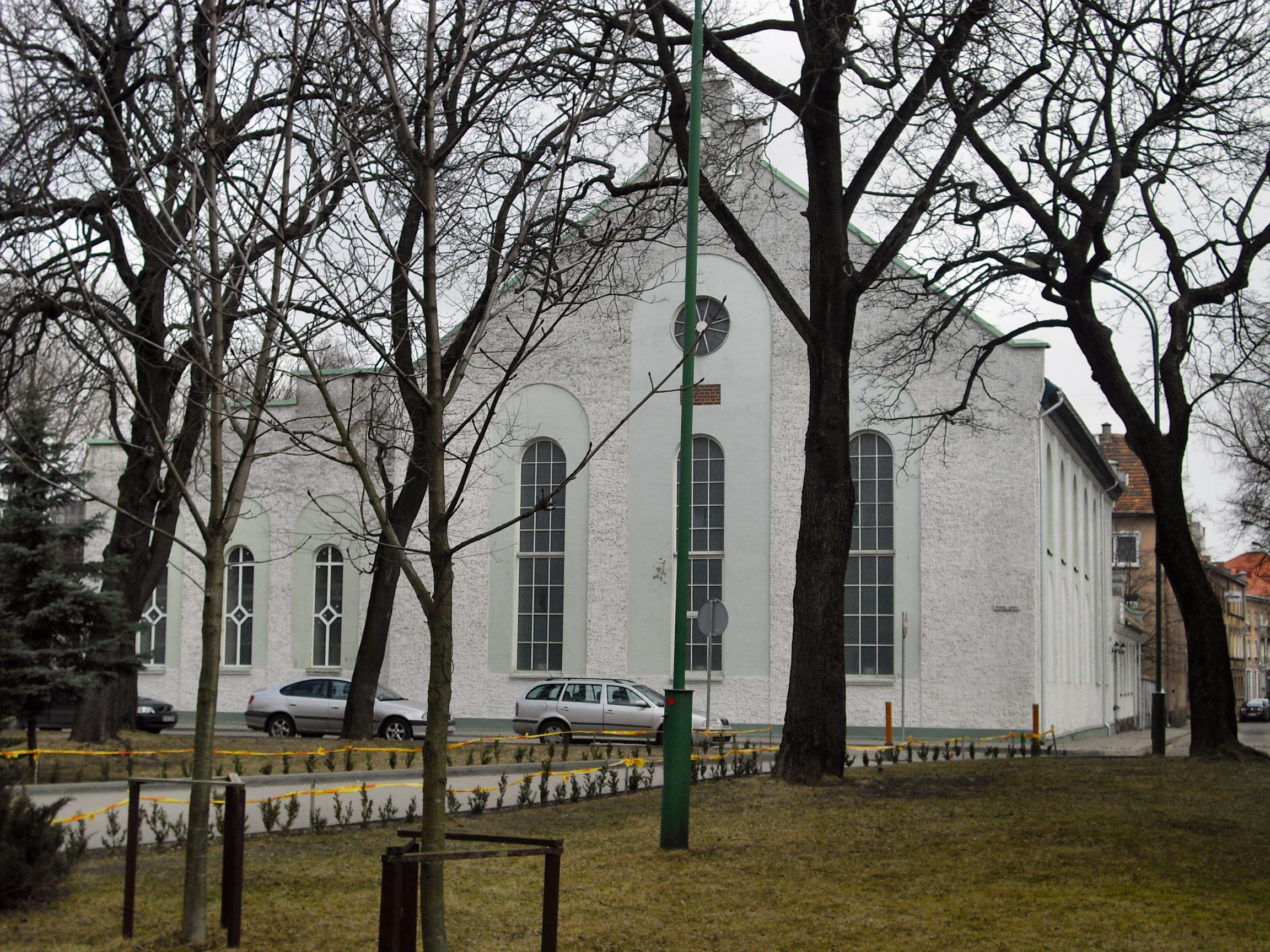 Baptistenkirche in Klaipeda / Litauen